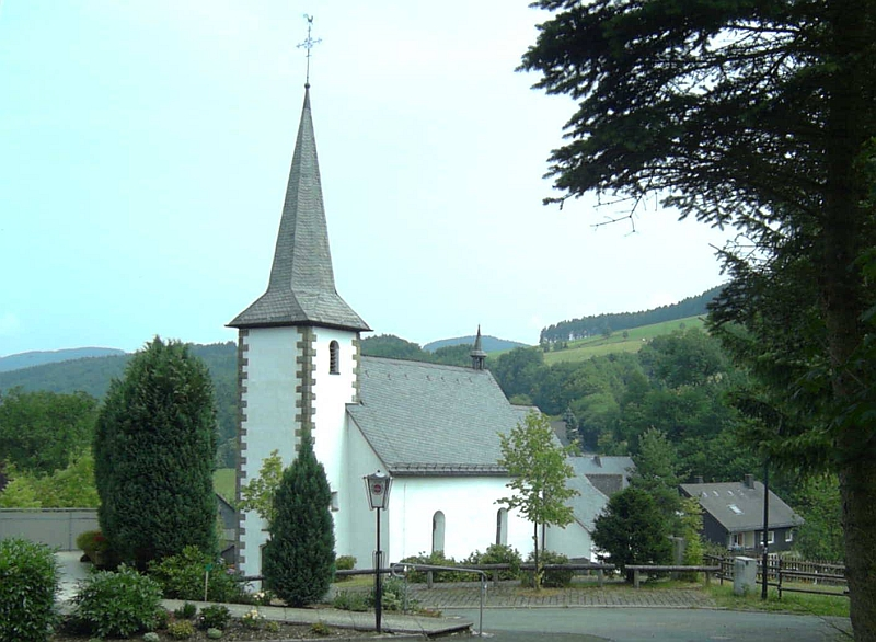 Kirche in Brabecke (Schmallenberg), Germany.